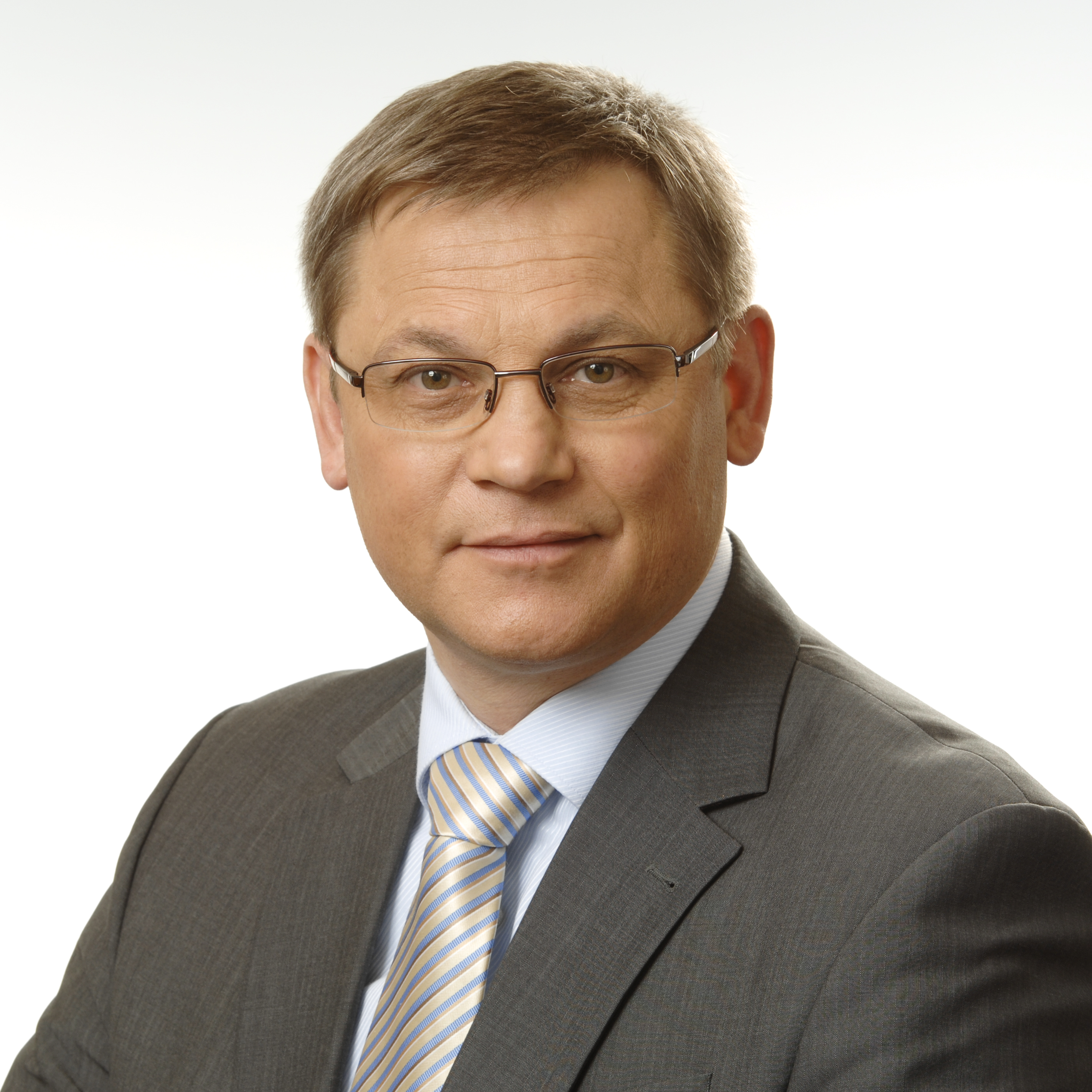 Fraktionsvorsitzender Uwe Höhn